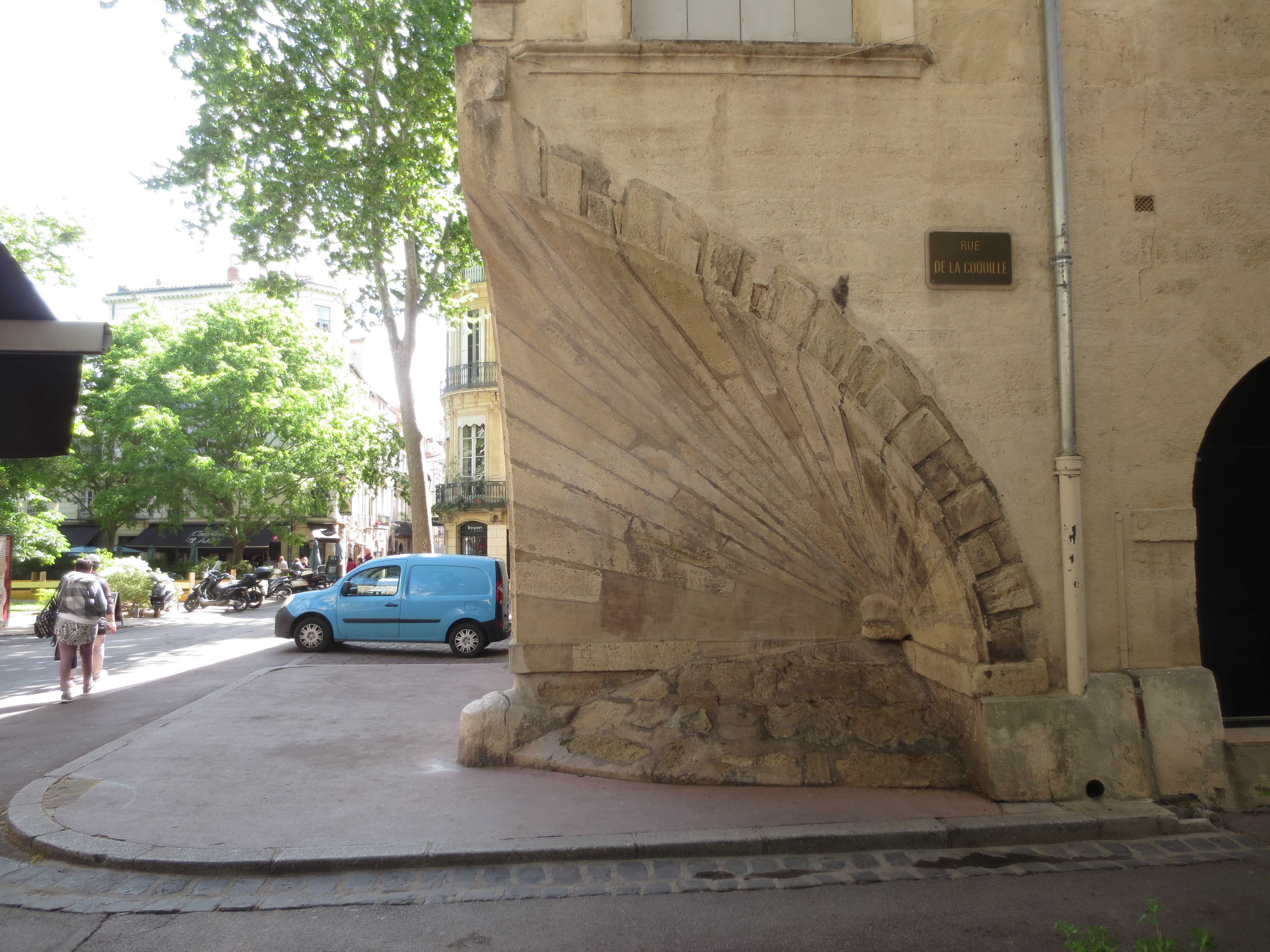 La coquille à Montpellier